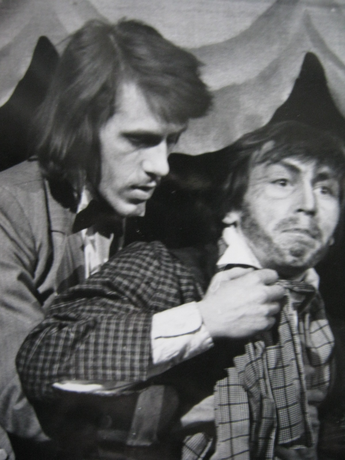 Сцена из спектакля «Житейские мелочи» по мотивам рассказов Антона Павловича Чехова в Челябинском государственном театре юных зрителей